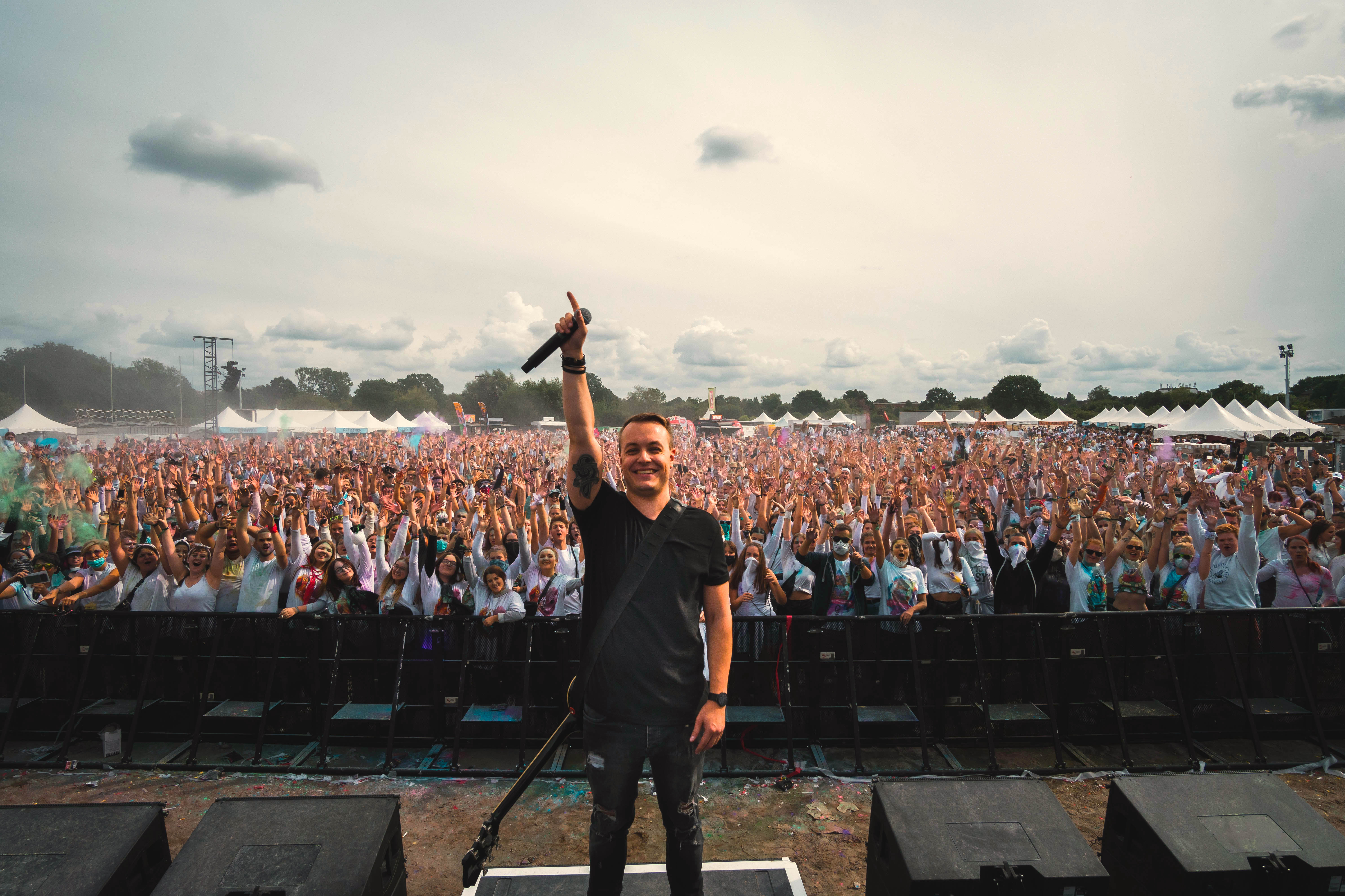 Tiscore auf dem Holi Festival Of Colors in Hamburg (2019)